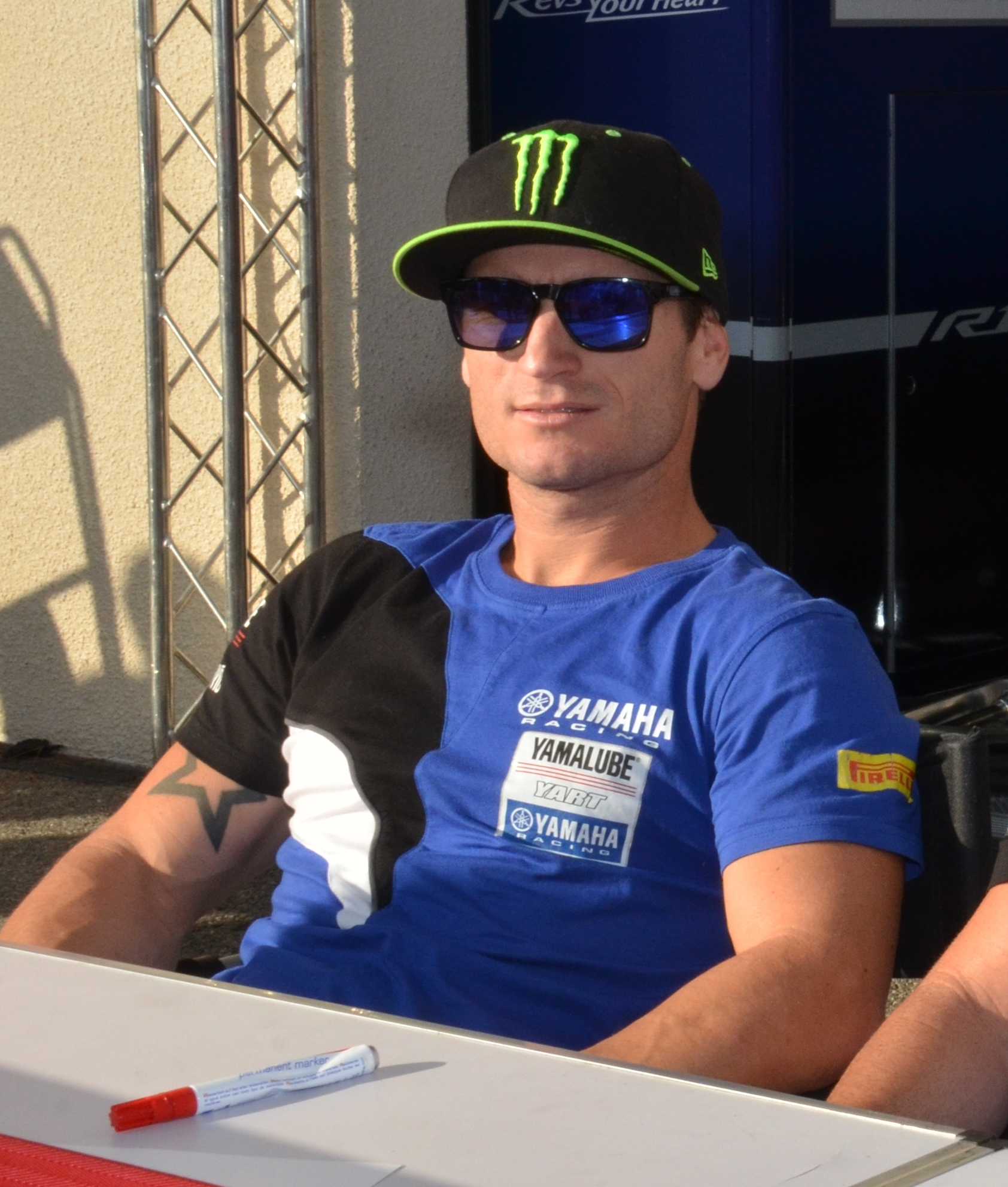 Broc Parkes lors du Bol d'Or 2016